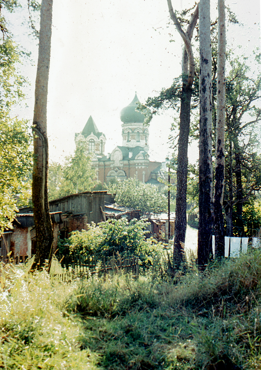 Бывшая православная Церковь Пресвятой Троицы до её перестройки. [1]